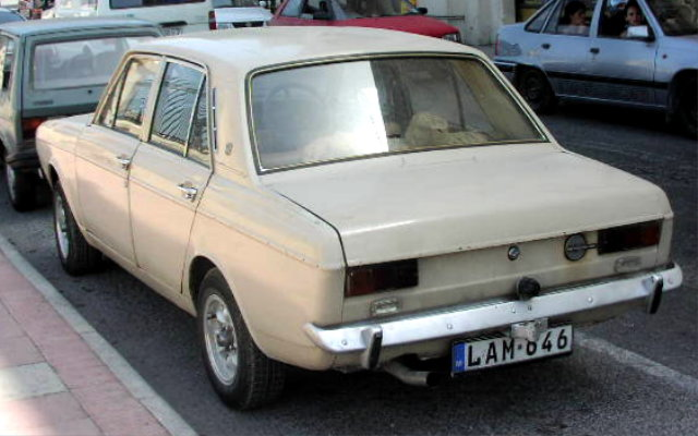 Hillman Hunter Sedan